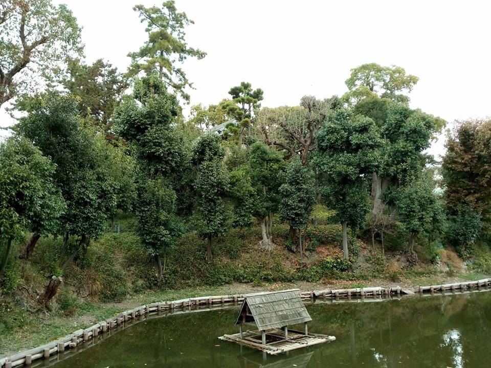 御願塚主墳の帆立貝式古墳を示す堀のくびれ部分の写真2016.12.04撮影